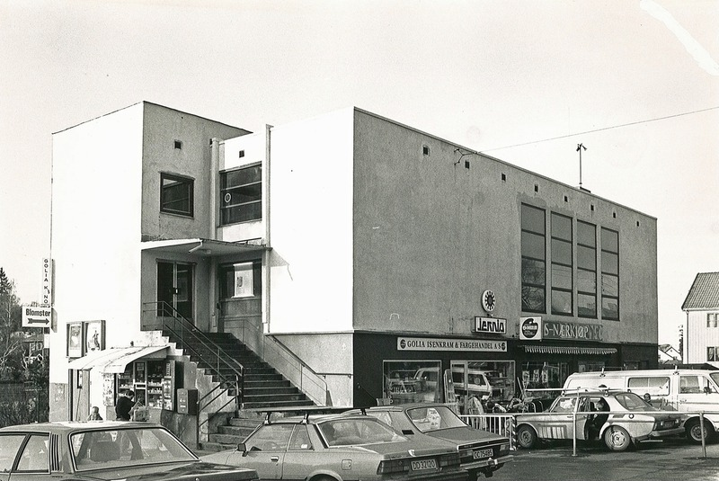 Golia kino. Golia samvirkelag.